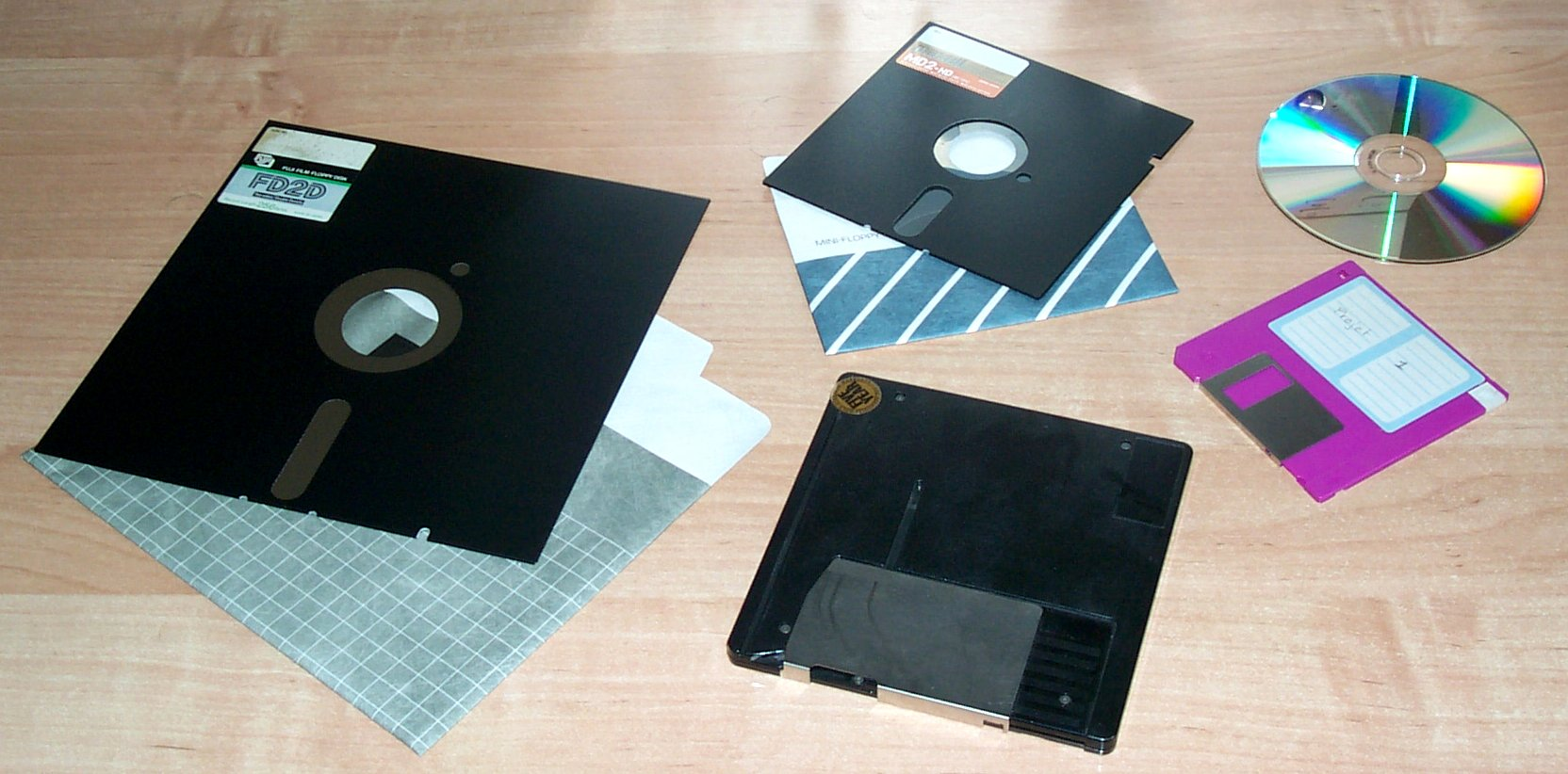 Disquettes A gauche : disquette 8" En haut : disquette 5" 1/4 En bas : [inconnu, disquette dur de 5" 1/4] A droite : disquette 3" 1/2 En haut à droite : un DVD+R (pour comparaison de taille)